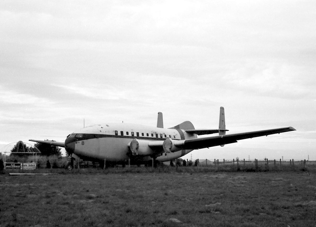 seen at Aeroclub de L' Eure Evreux France